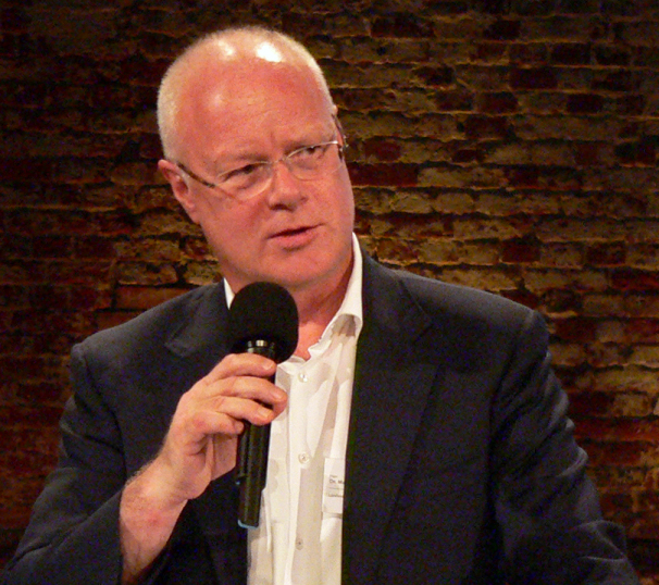 Markus Harzenetter beim 85. Tag der Denkmalpflege in Oldenburg